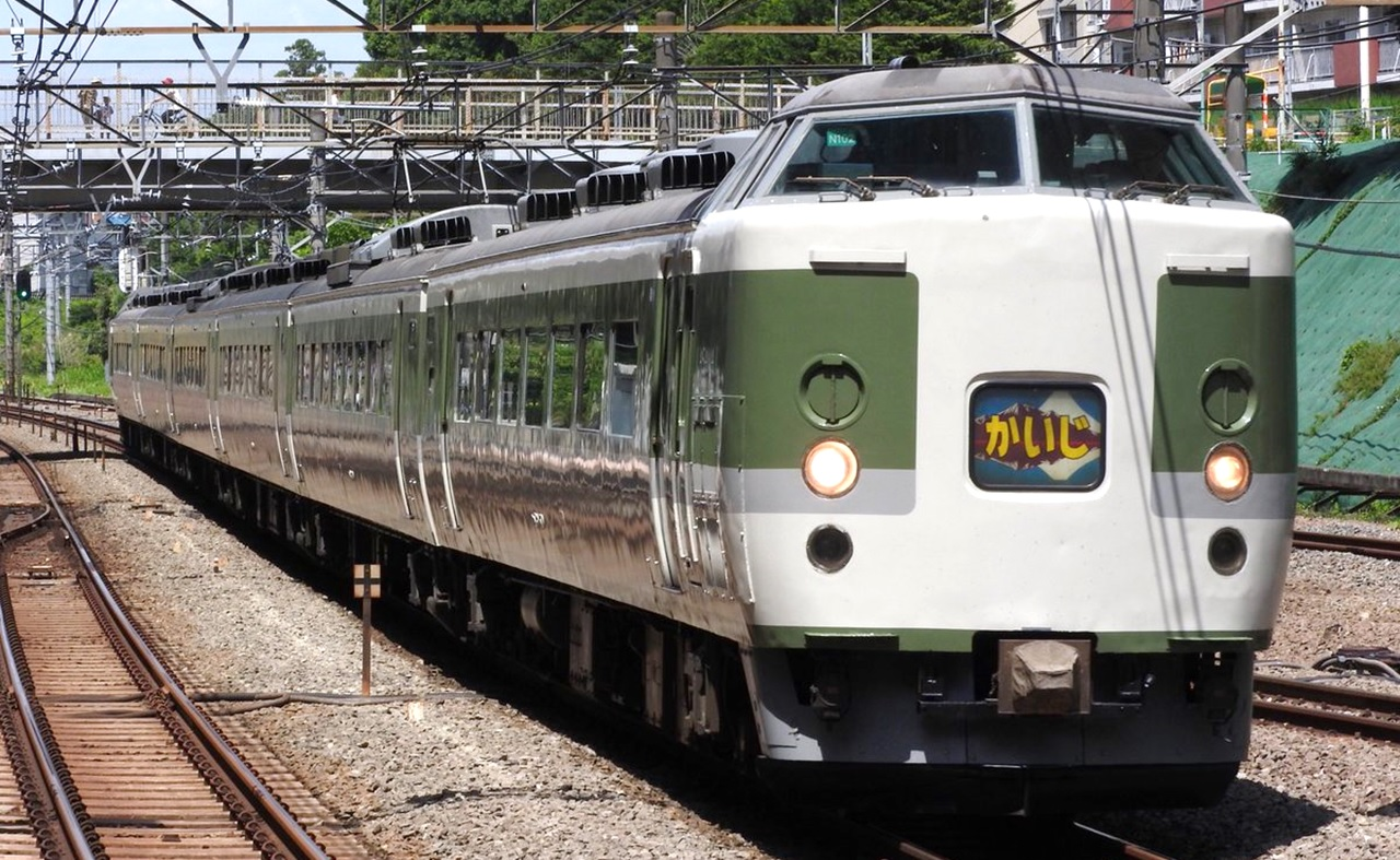 臨時列車等に使用される189系N102編成。